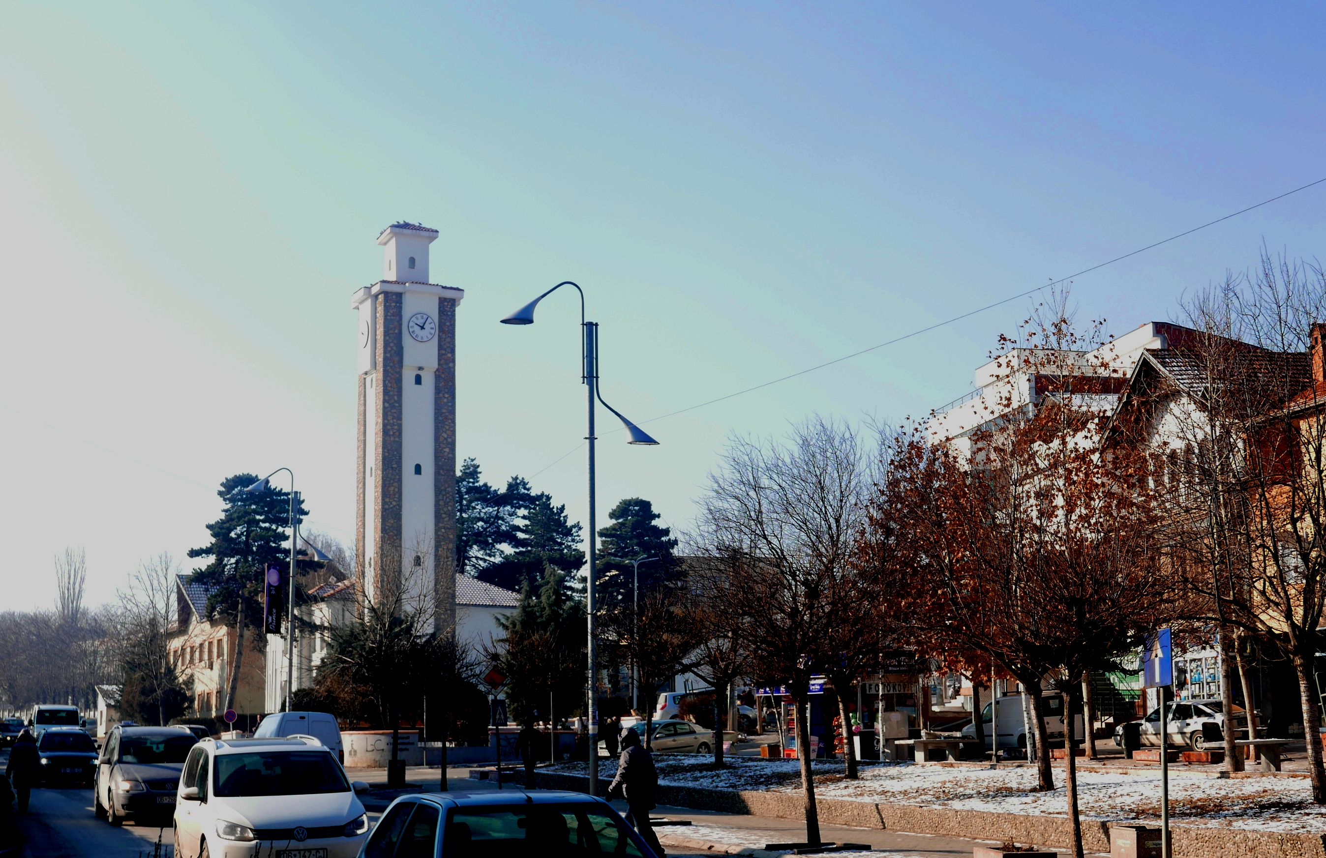 Sahat kulla , Gjilan, në janarin e ftohet